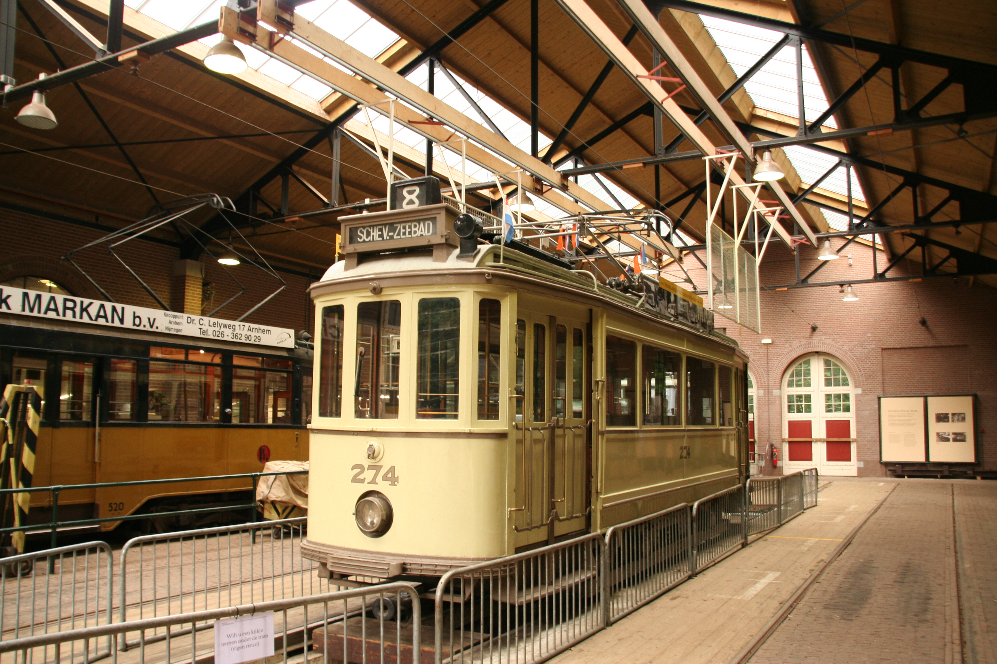 HTM tram 274 in de tramremise in het Nederlands Openluchtmuseum te Arnhem.